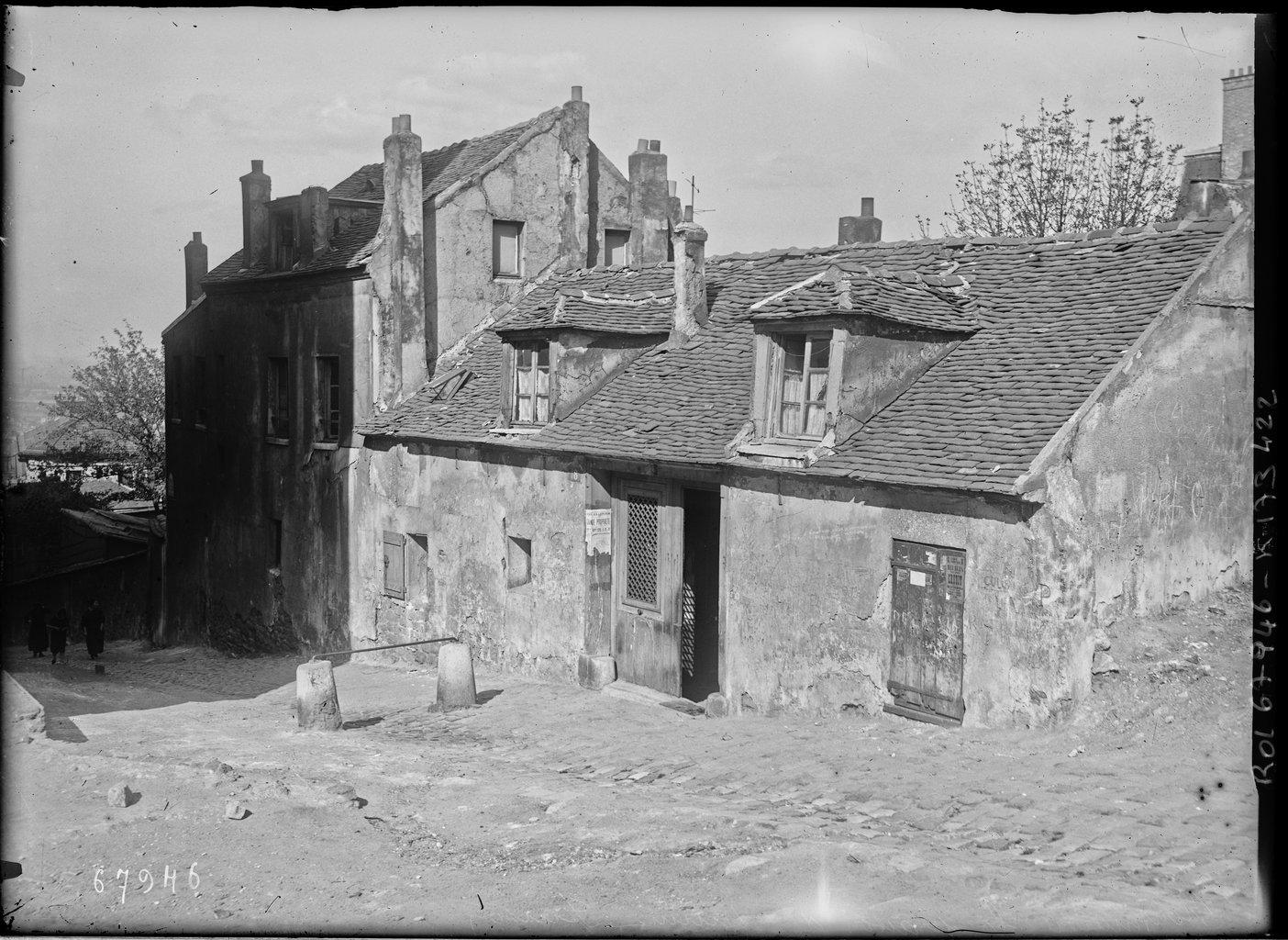 Montmartre, la maison de Mimi Pinson [rue du Mont-Cenis].